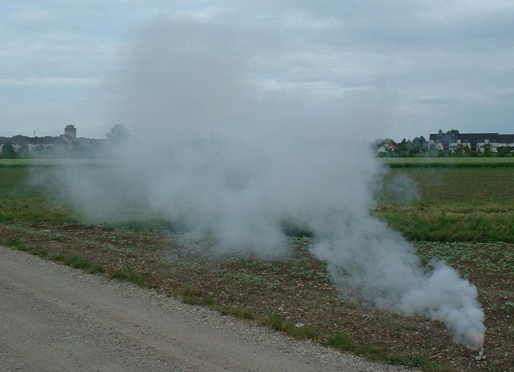 Rauchpulver aus Zucker und Salpeter Verhältnis: 1:2 (Zucker:KNO3)